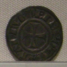 Doppio Grosso o Pepolese, Bologna Taddeo Pepoli (1337-1347)